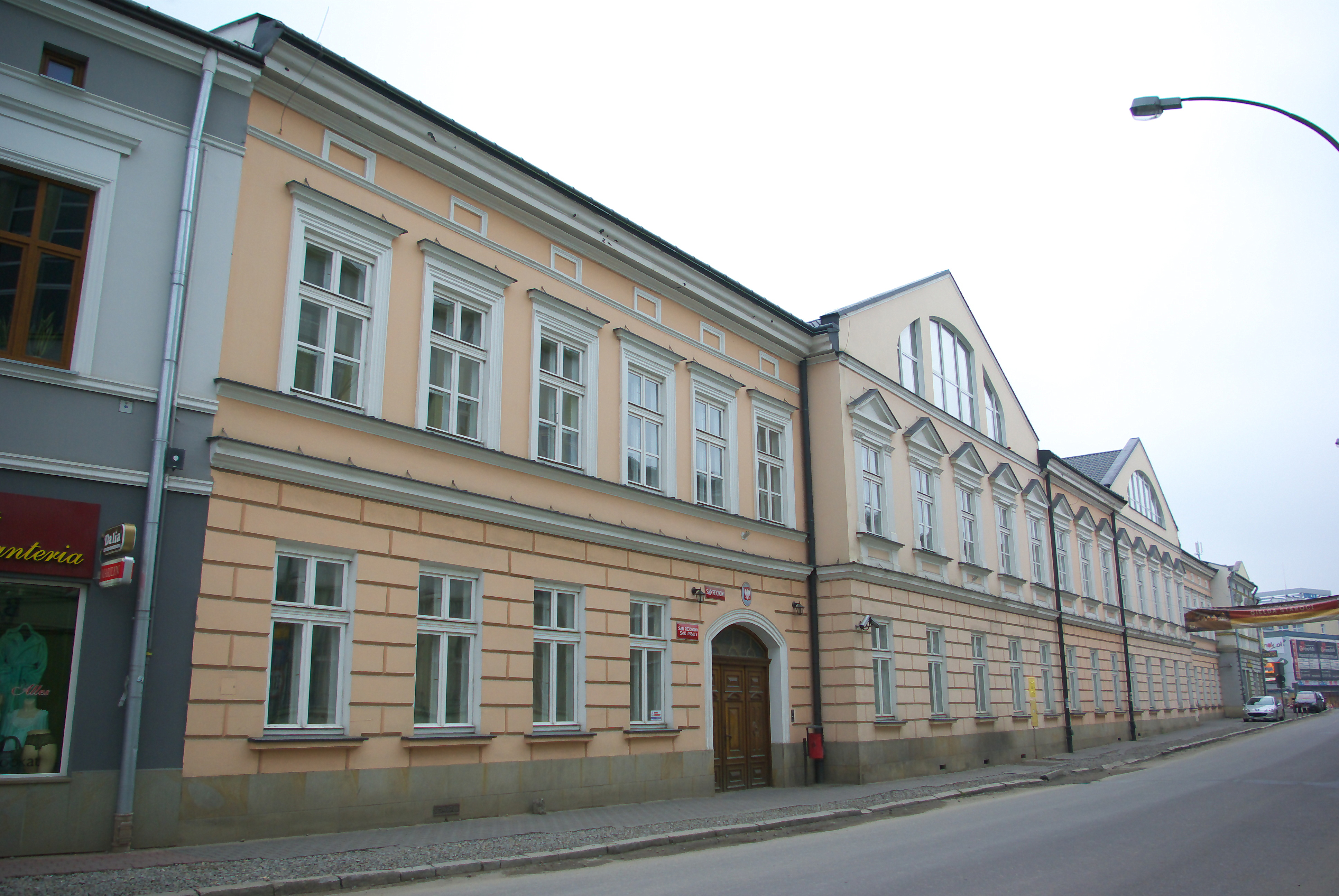 Budynek przy ulicy Kościuszki 5 w Sanoku. Siedziba Sądu Rejonowego w Sanoku